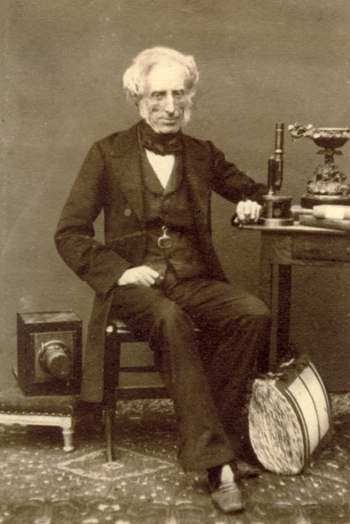 Луи́ Альфо́нс де Бребиссо́н (фр. Louis Alphonse de Brébisson; 1798—1872) — французский натуралист, археолог и фотограф.